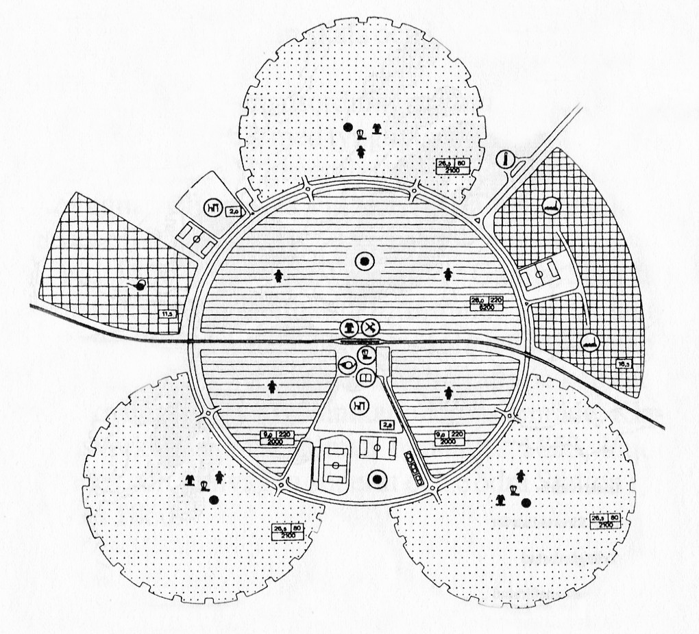 Schemaplan för en ABC-stad